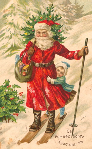 Дореволюционная рождественская открытка со святым Николаем (Дедом Морозом ?).